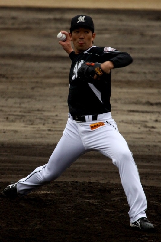 日本プロ野球 千葉ロッテマリーンズの秋親(山田秋親) 投手